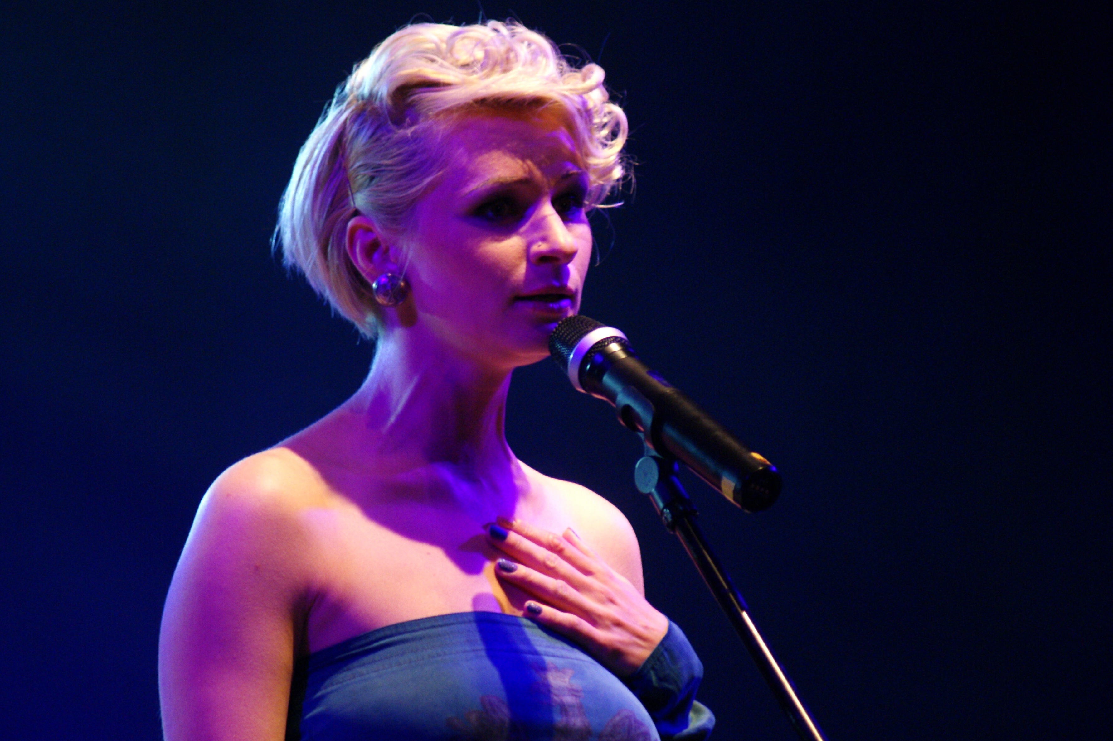 Lilu